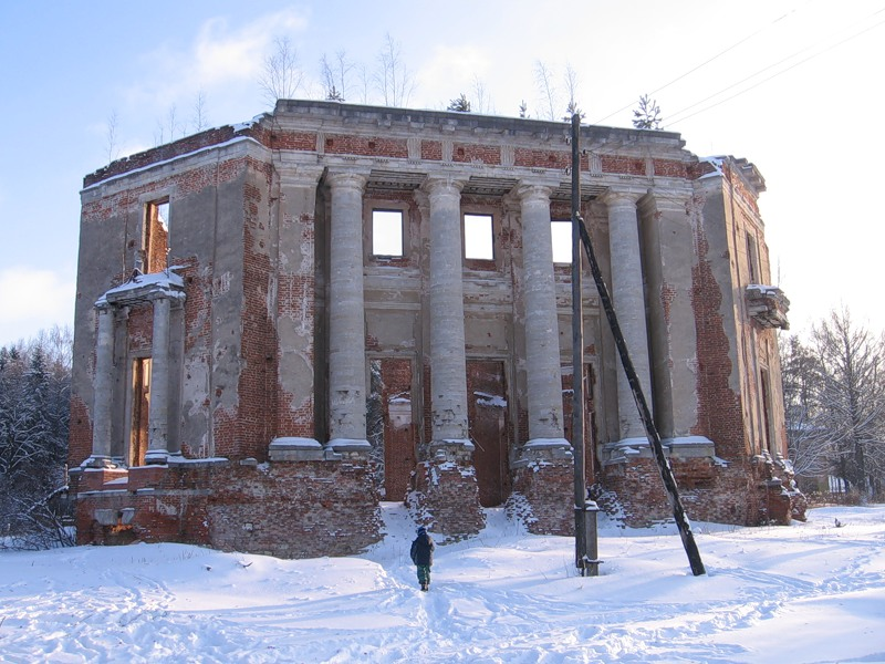 Главный дом (Москва и Московская область, Наро-Фоминск, село Петровское-Алабино)